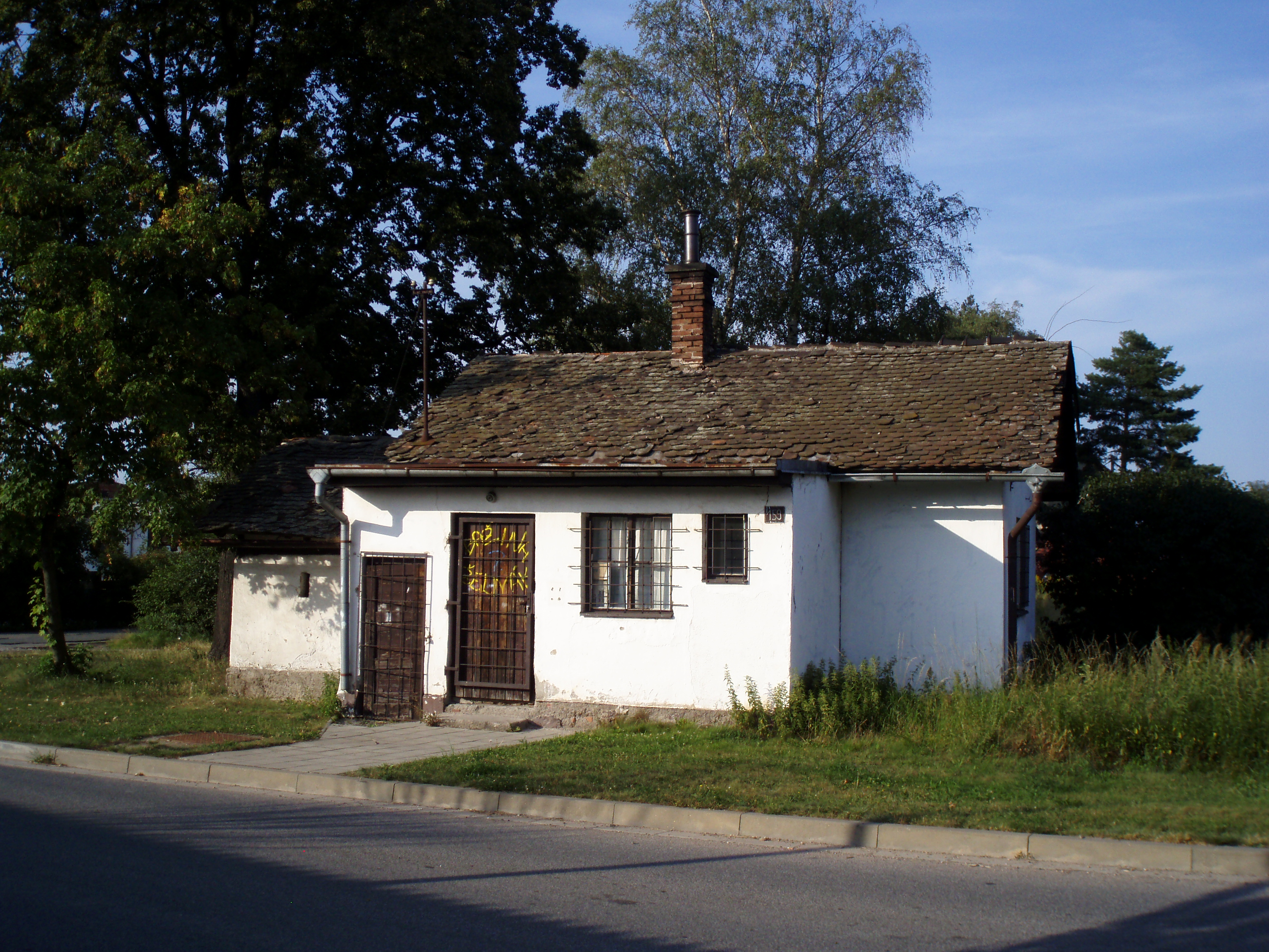 Strážní domek v Kuklenách (již neexistuje), Pardubická 159/2.